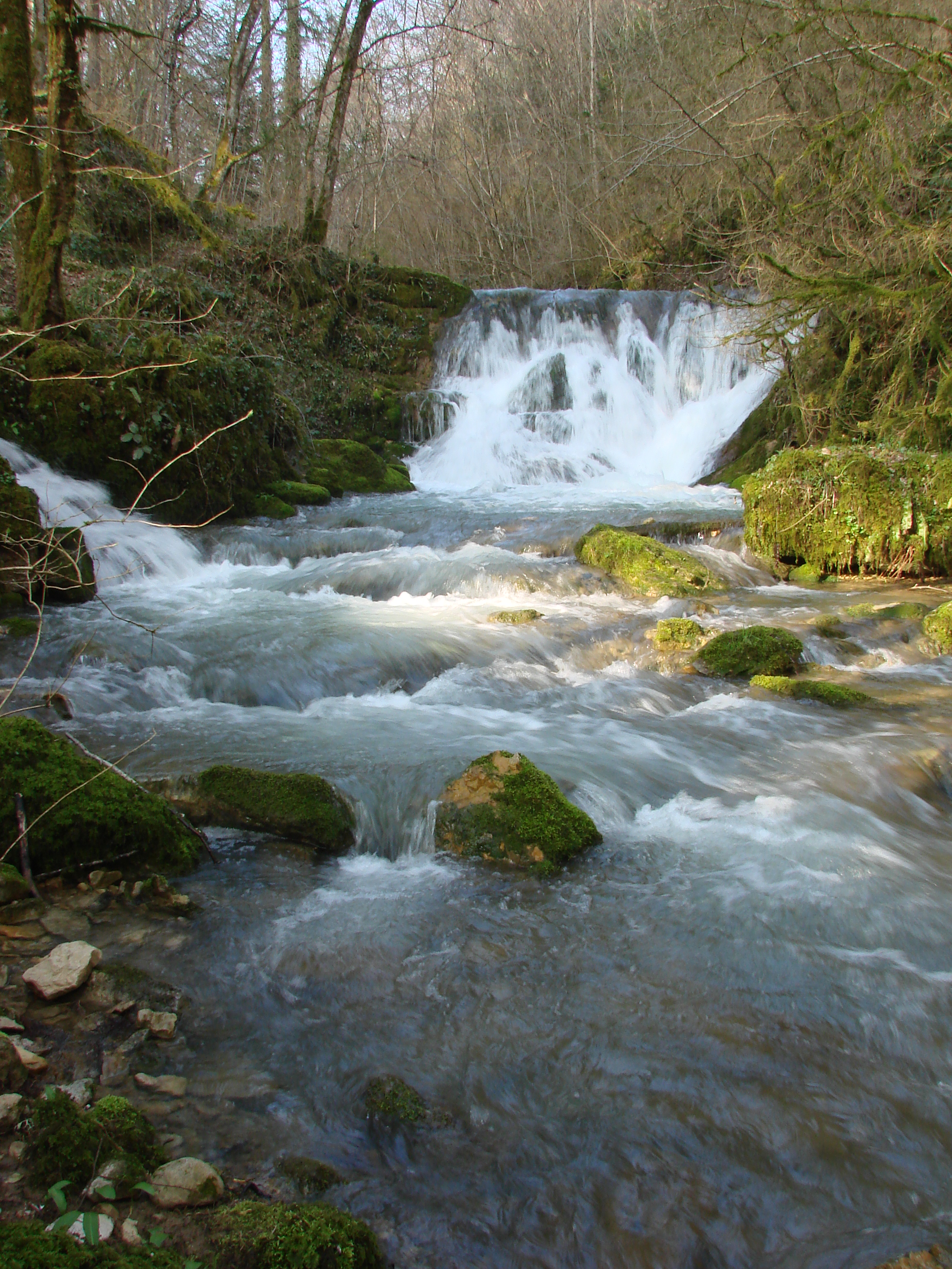 Cascade sur le Brevon à Saint-Rambert-en-Bugey